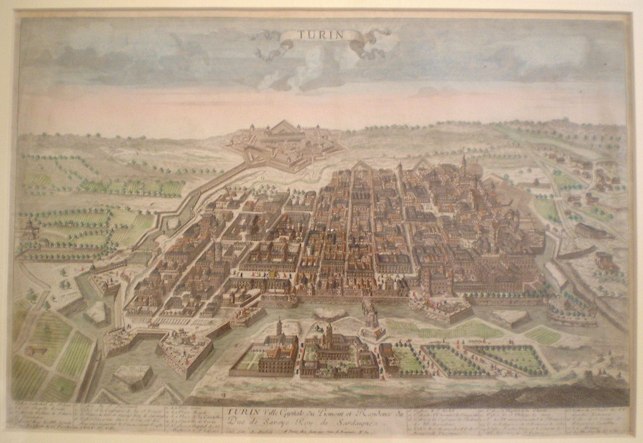 Vista quattro-cinquecentesca della città di torino. Dall'archivio libreria antiquaria Bourlot di Marco Birocco, Torino